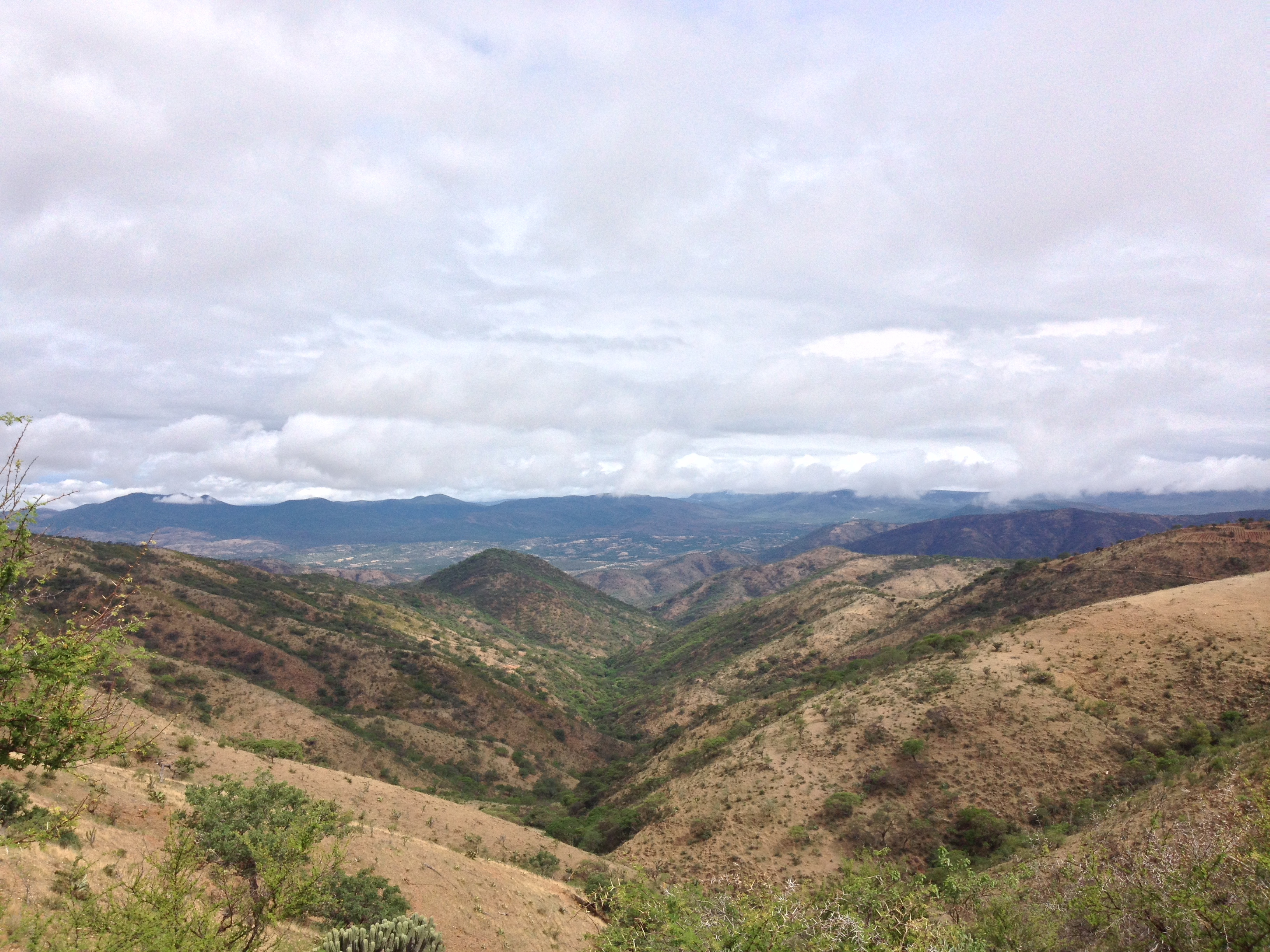 Olleras, Oaxaca